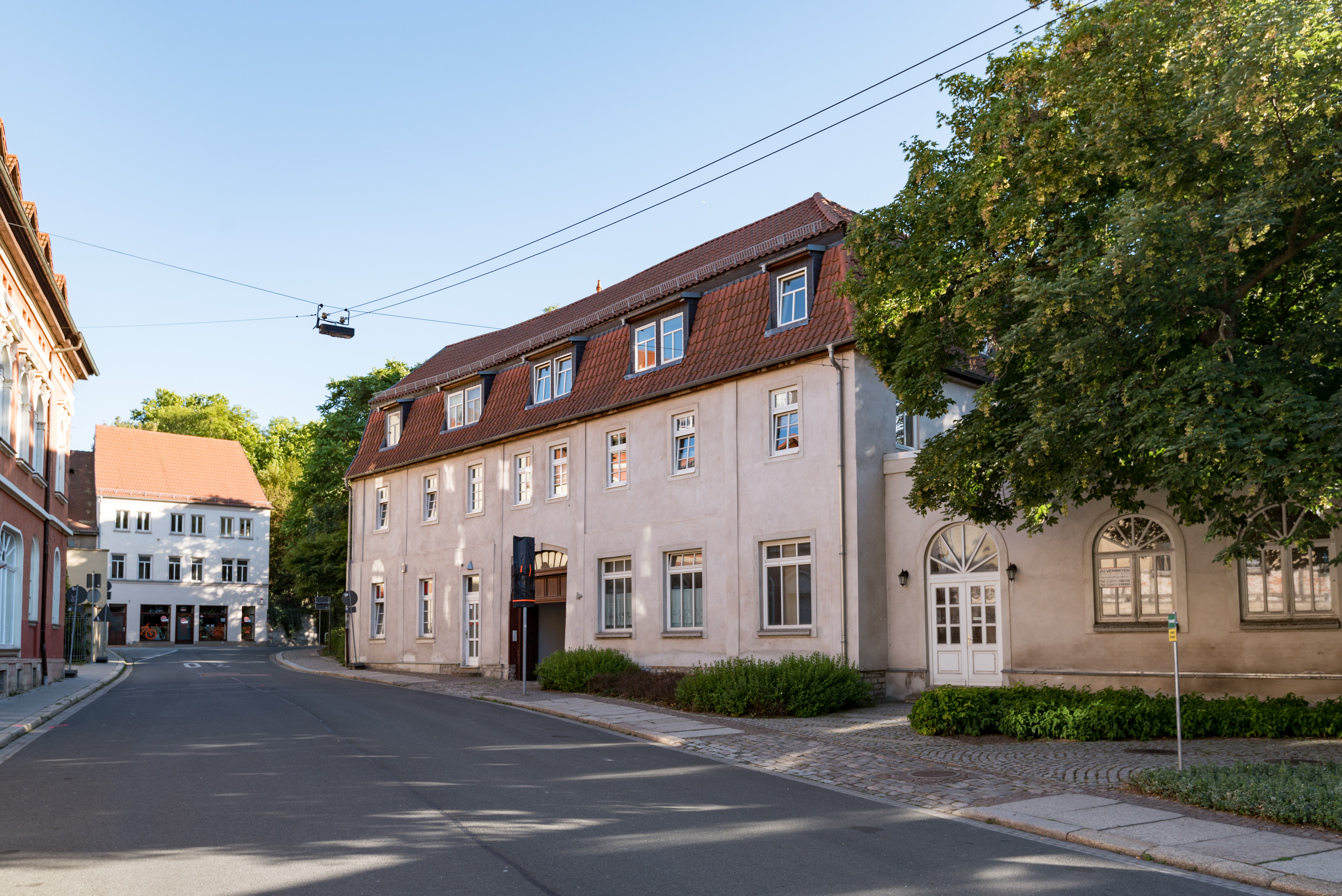 Weißenfels, Saalstraße 4